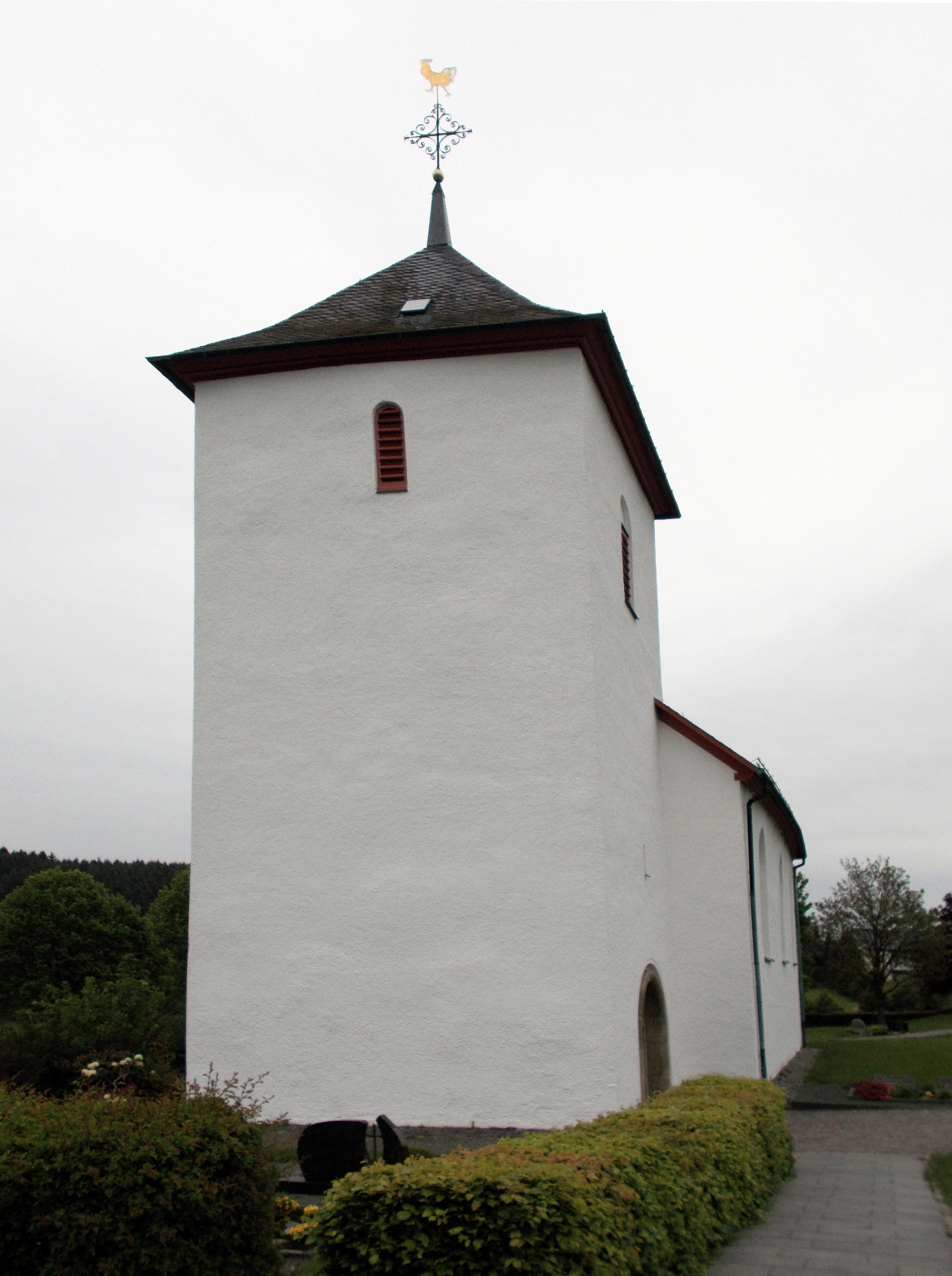 St. Marien Kirche in Wenden-Römershagen (Germany)